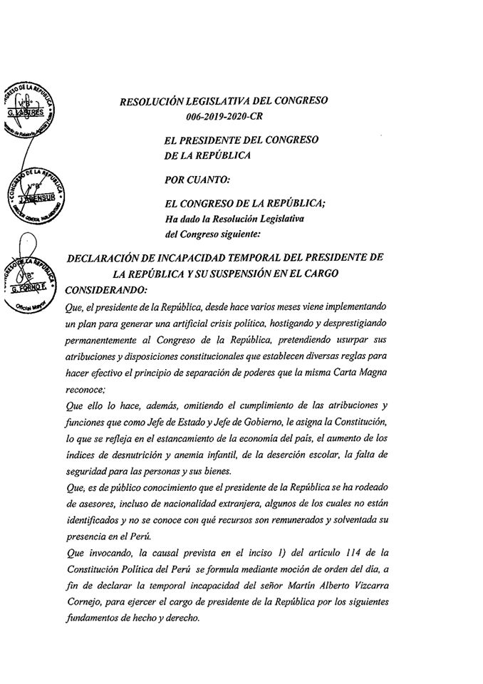 Declaración de incapacidad temporal del presidente de la República y suspensión en el cargo